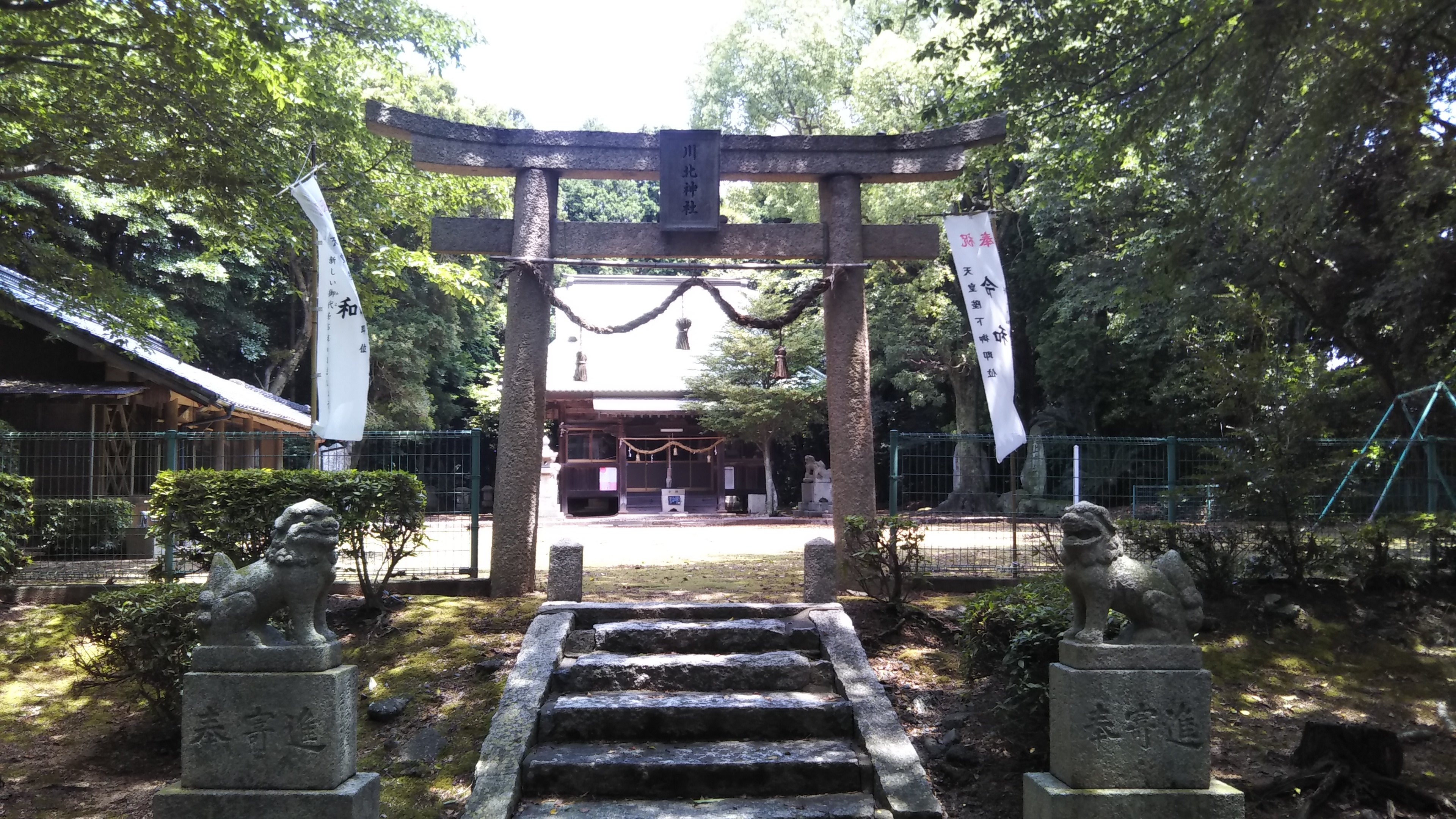 山口県下関市大字綾羅木川北神社二ノ鳥居